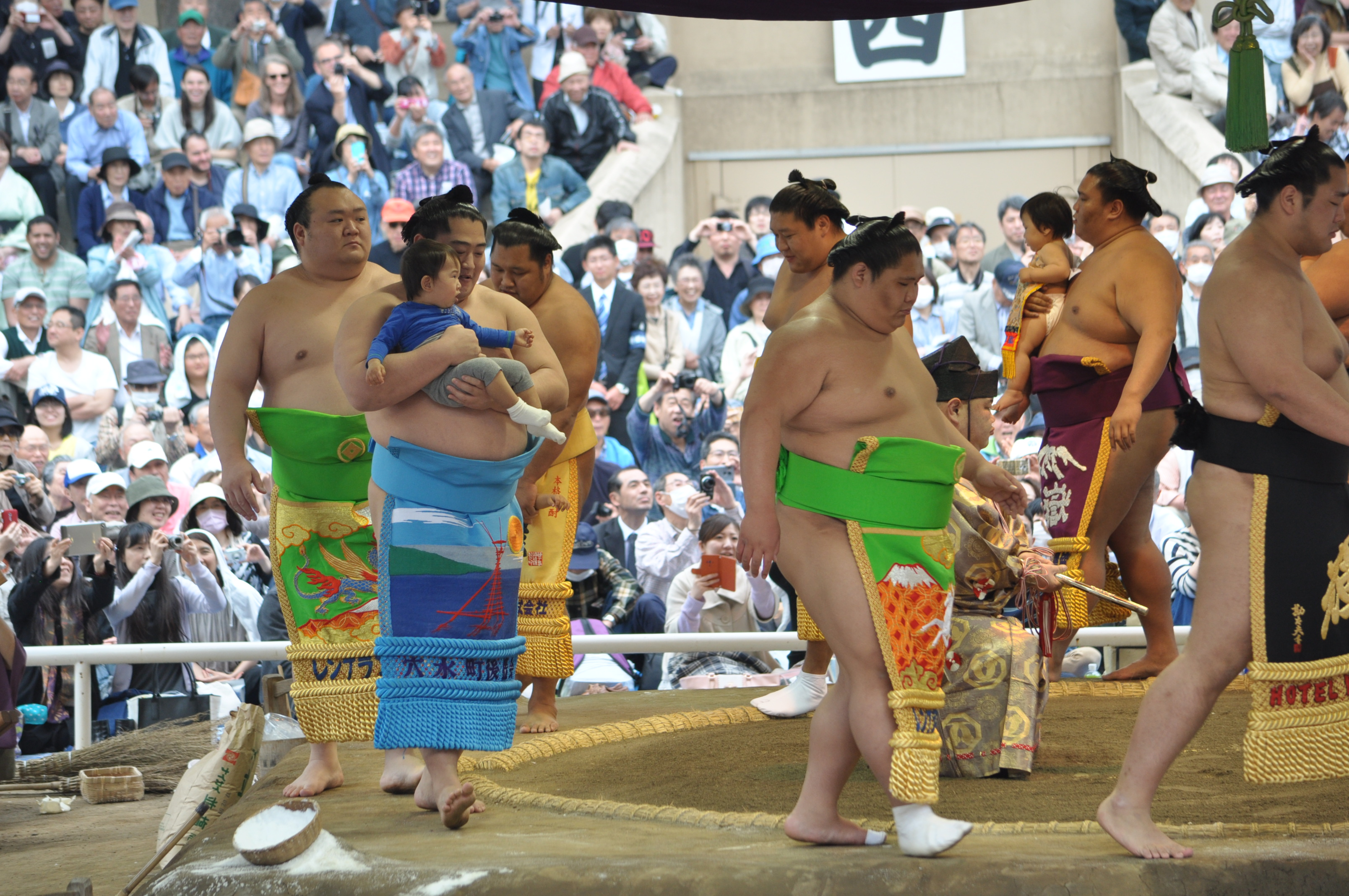 遠藤 聖大